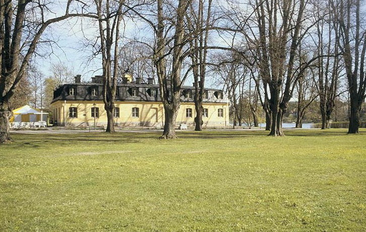 SOLNA ULRIKSDAL 2:3 - husnr 15, EKONOMIBYGGNADEN (EKONOMIHUSET)